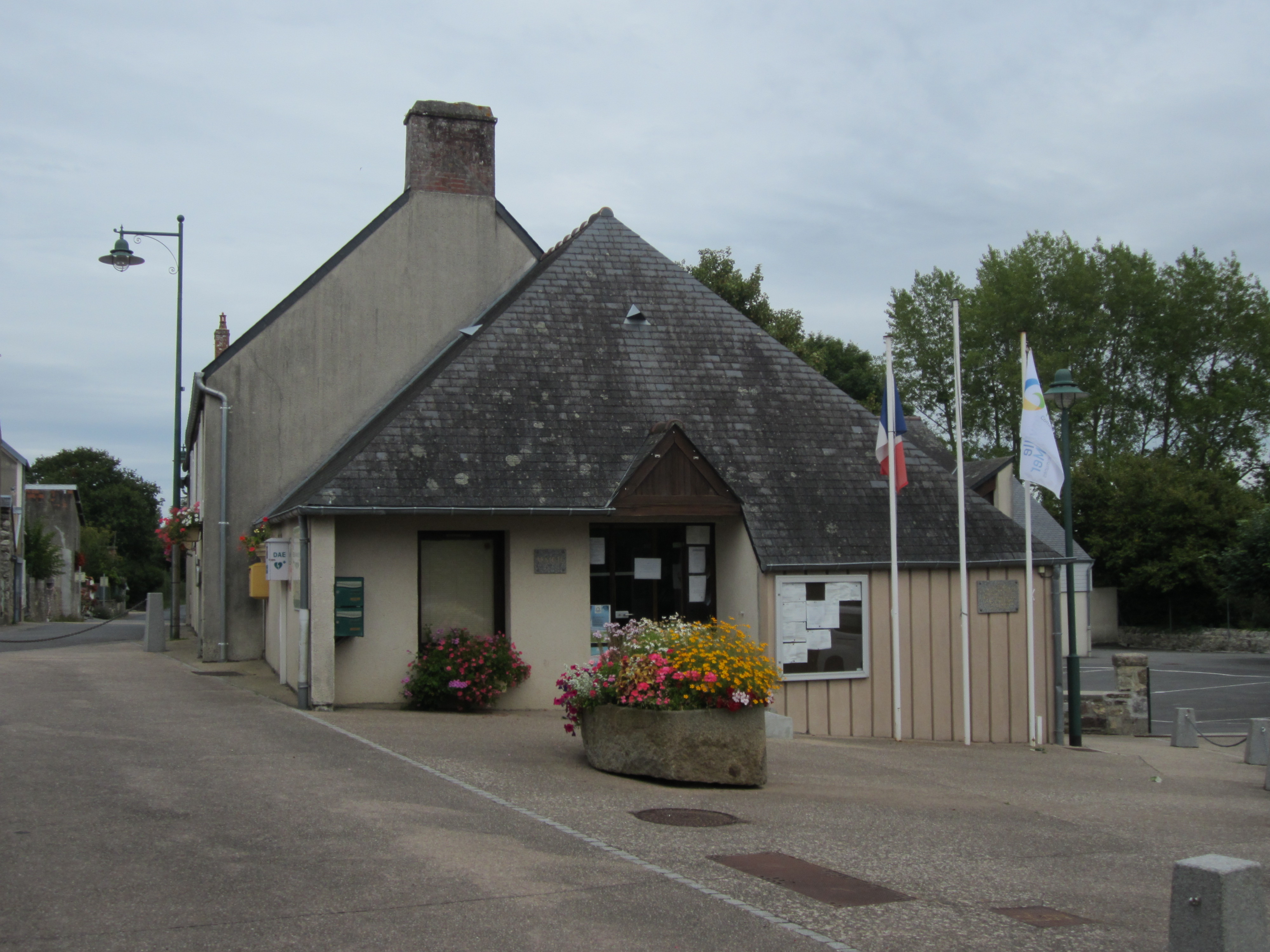 Longueville, Manche